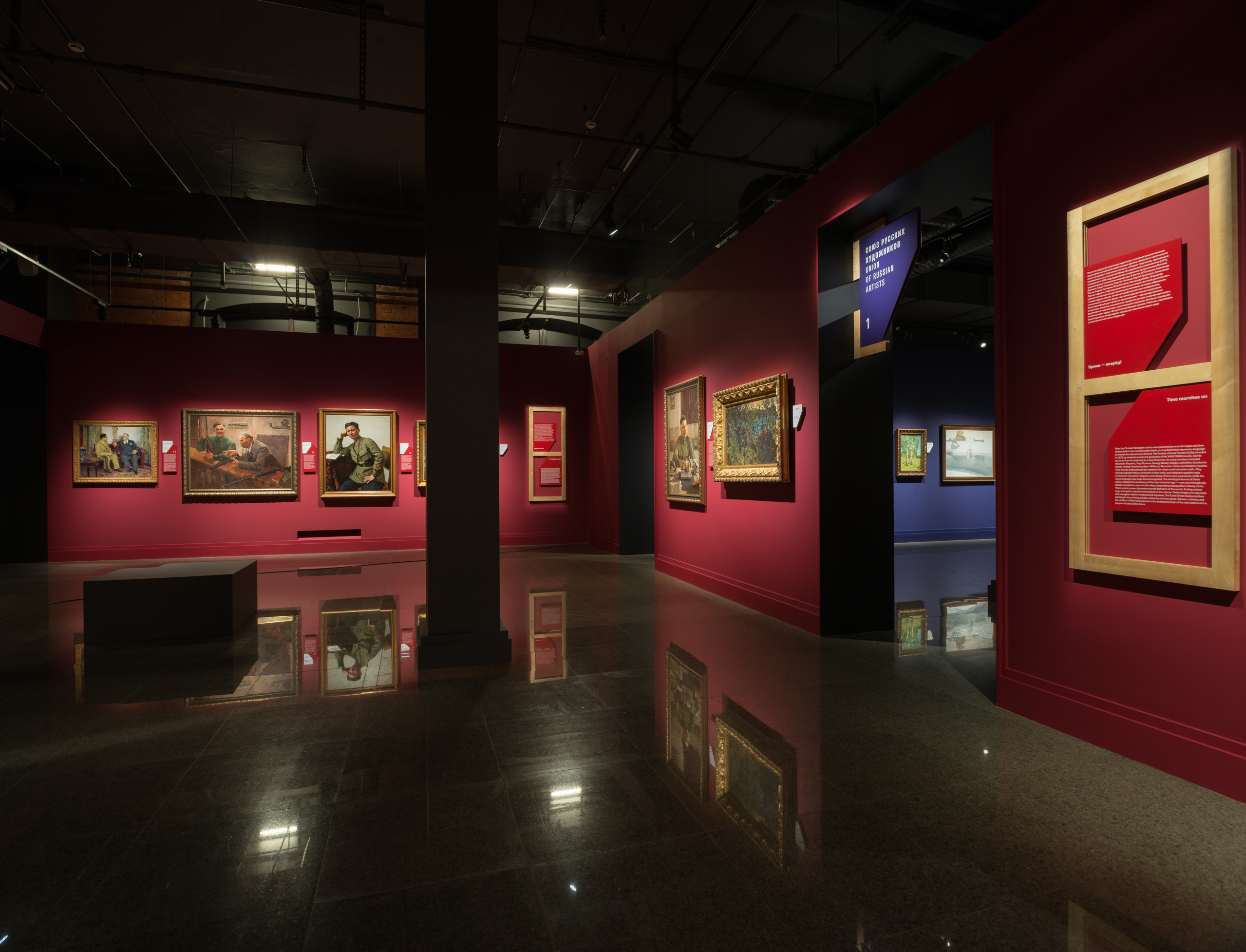 1 этаж ИРРИ после реконструкции к пятилетию. Фото: Никита Рыбаков